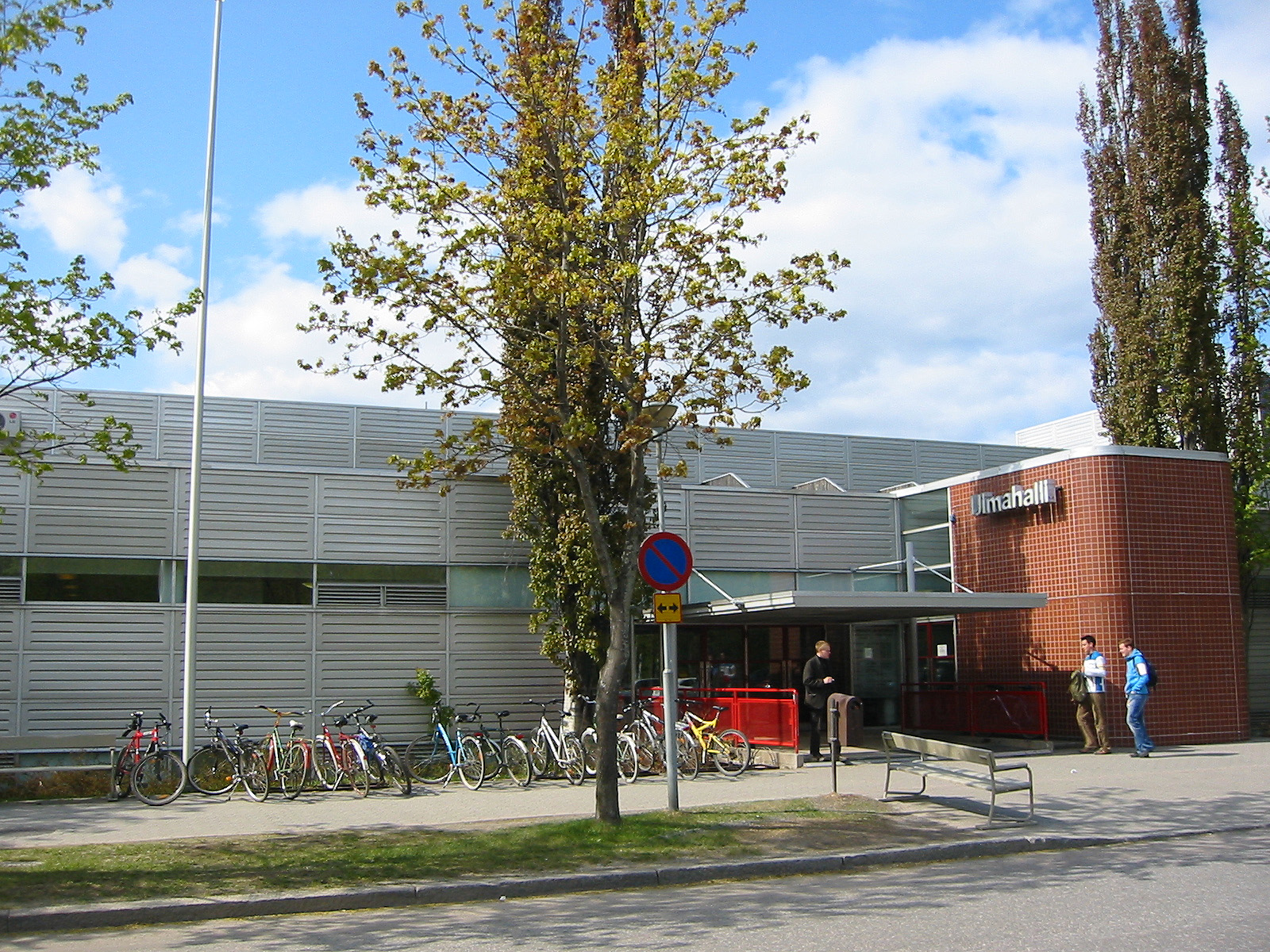 Kalevan uimahalli. Tampere, Finland.